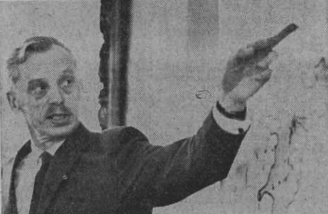 Arkitekten Bo Fredzell